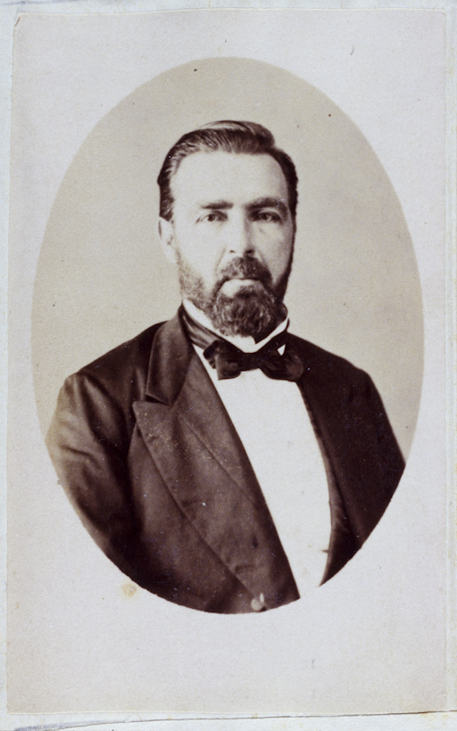 Obra que integra o acervo do Museu Paulista da USP. Coleção Militão Augusto de Azevedo.